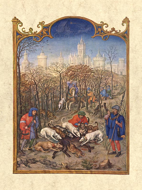 Dezember, Brevarium Grimani, fol. 13v (Flemish)